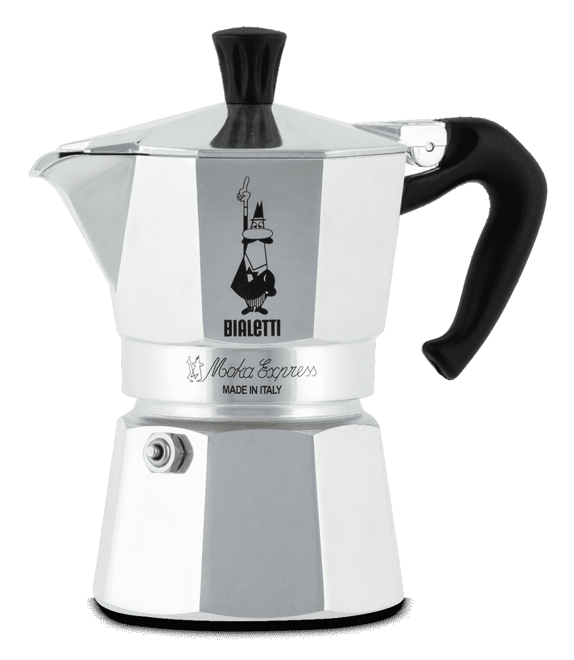 Eccellente esempio di Art Deco, la Moka ha un design che è stato perfezionato negli anni per rendere quest’icona uno strumento sempre più ergonomico e dalle forme eleganti, mantenendo però le stesse carettistiche funzionali che l'hanno resa perfetta nella sua essenzialità: il raccogliotore e la caldaia ottagonale in alluminio e l'esclusiva valvola ispezionabile e di facile pulizia.